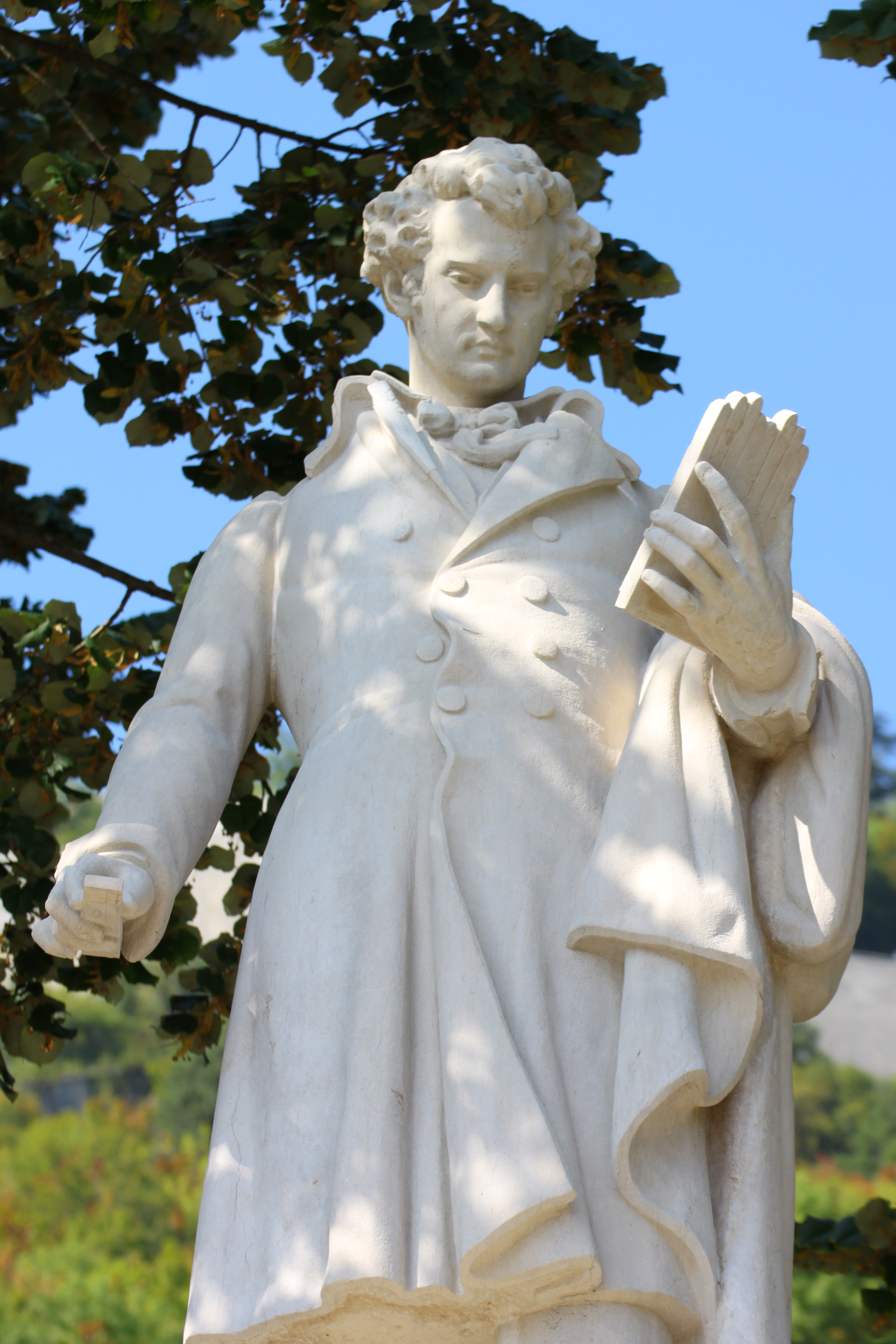 Statue de Xavier Jouvin située sur la Place Xavier Jouvin à Grenoble